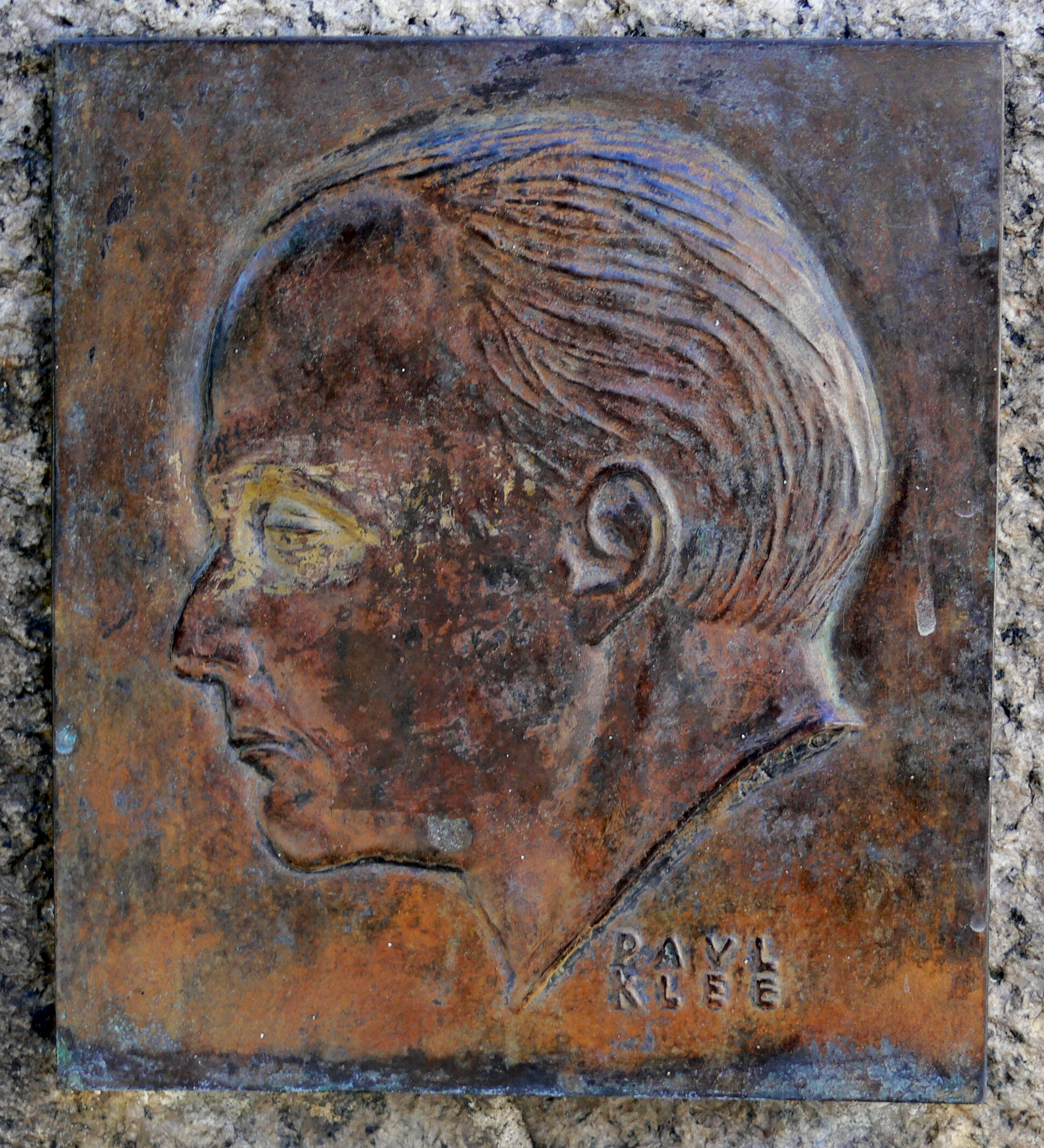 Bronzerelief Porträt Paul Klee am Amthausbrunnen in Bern mit Signatur MFVETER (Fueter verwendete jeweils V statt U) am Halsansatz oben.